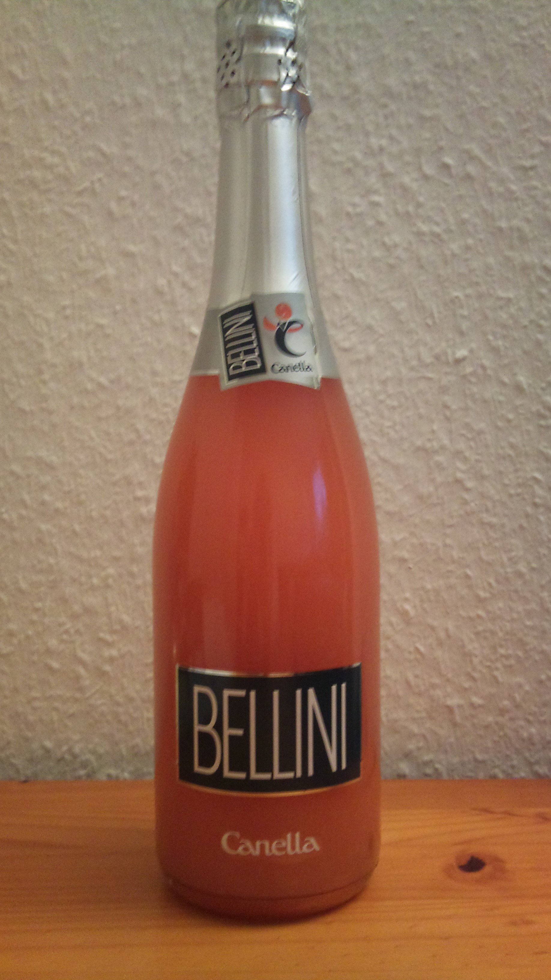 Eine typische Champagner Flasche mit dem Cocktail Bellini.